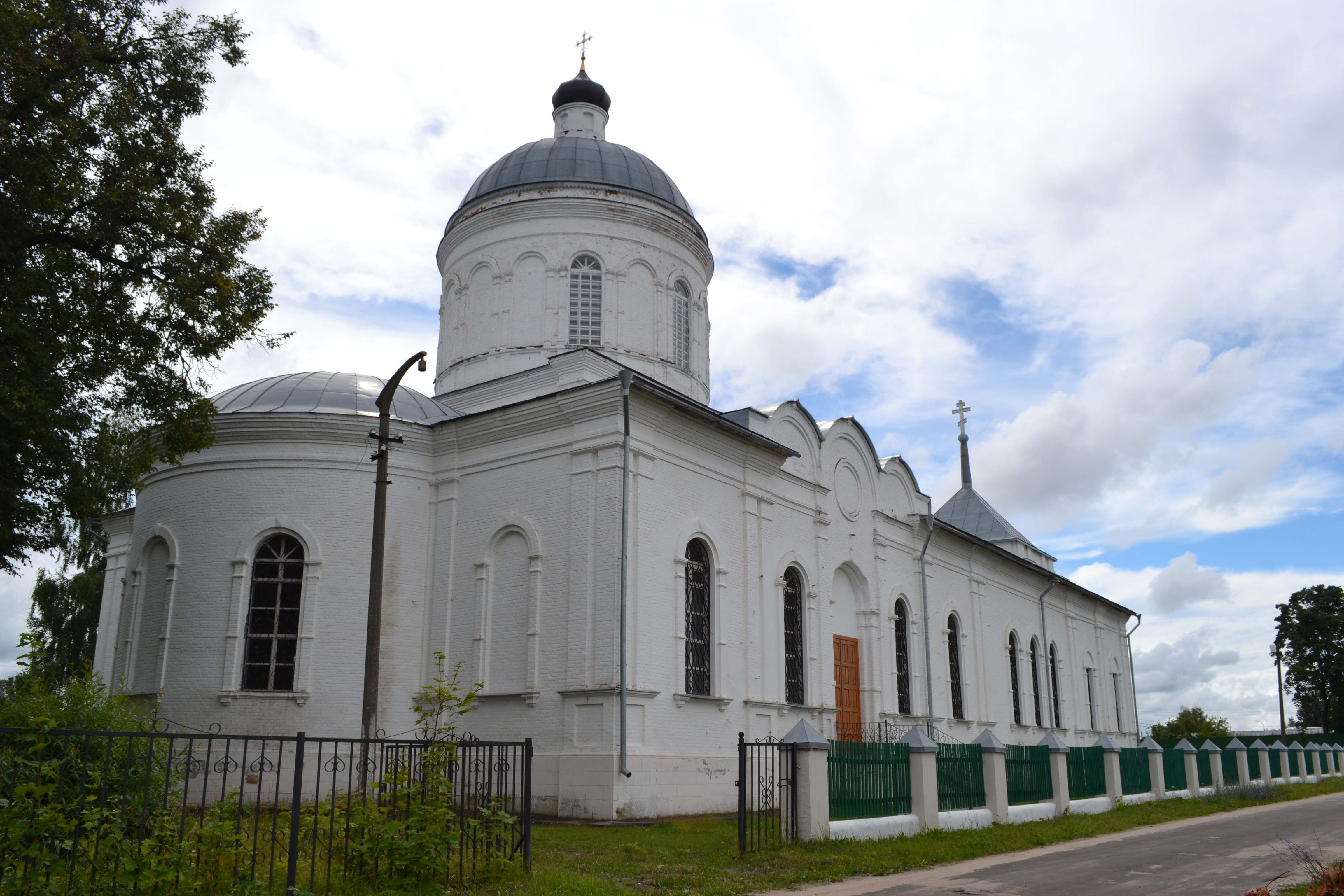 Церковь великомученика Димитрия Солунского (Москва и Московская область, село Дмитровский Погост, Рабочая улица)